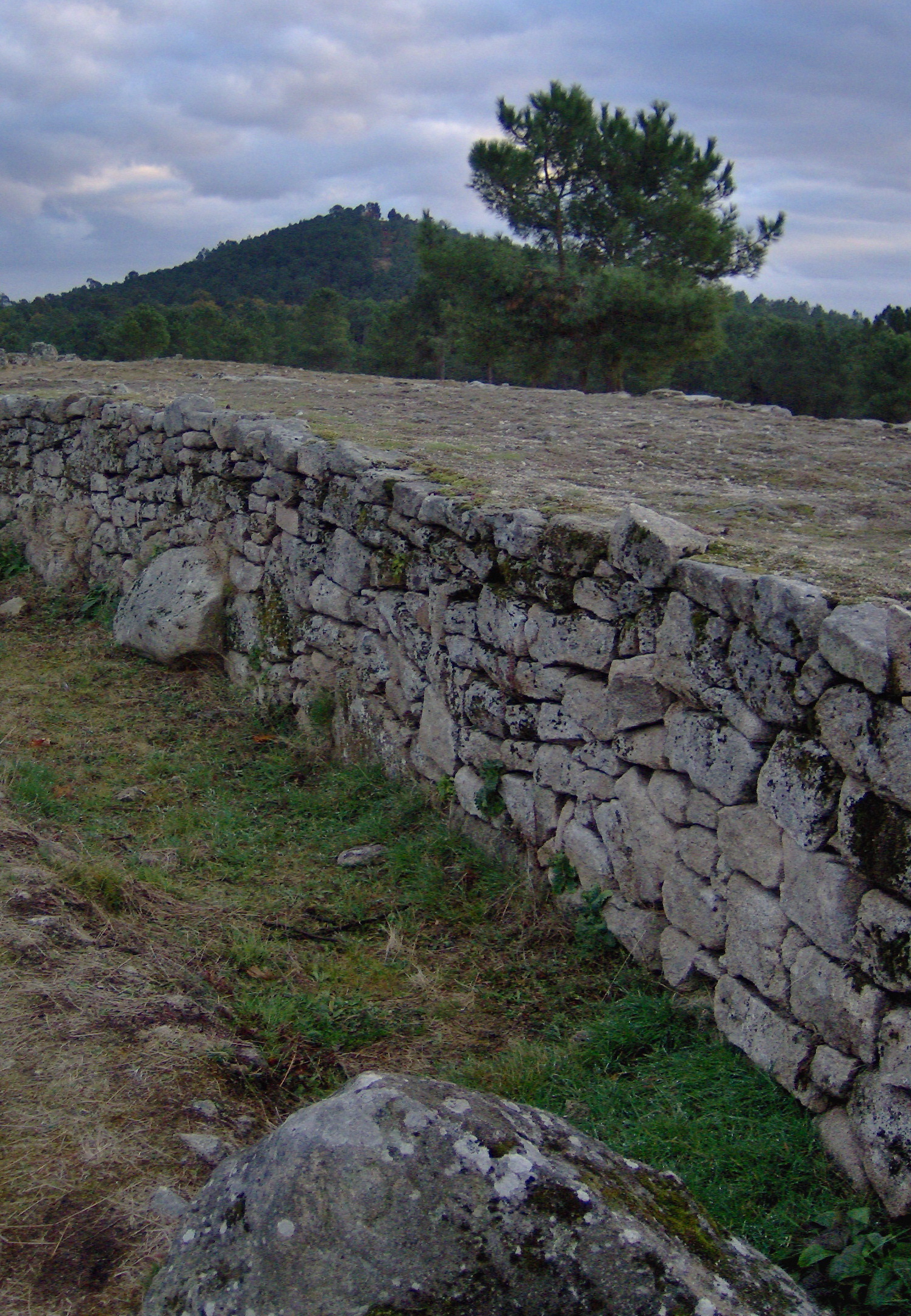 O cumio do Santrocado visto dende a Cidade de Lanobriga. Na parte inferior, a peneda coa inscripción IOVI. (C) Lanobriga.